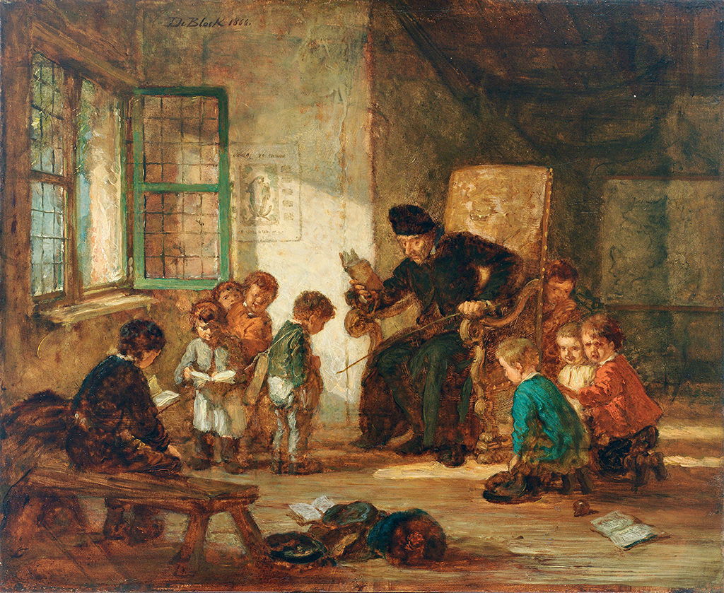 Lehrer in einer Grundschulklasse. Öl auf Holz, 25,5 x 31 cm